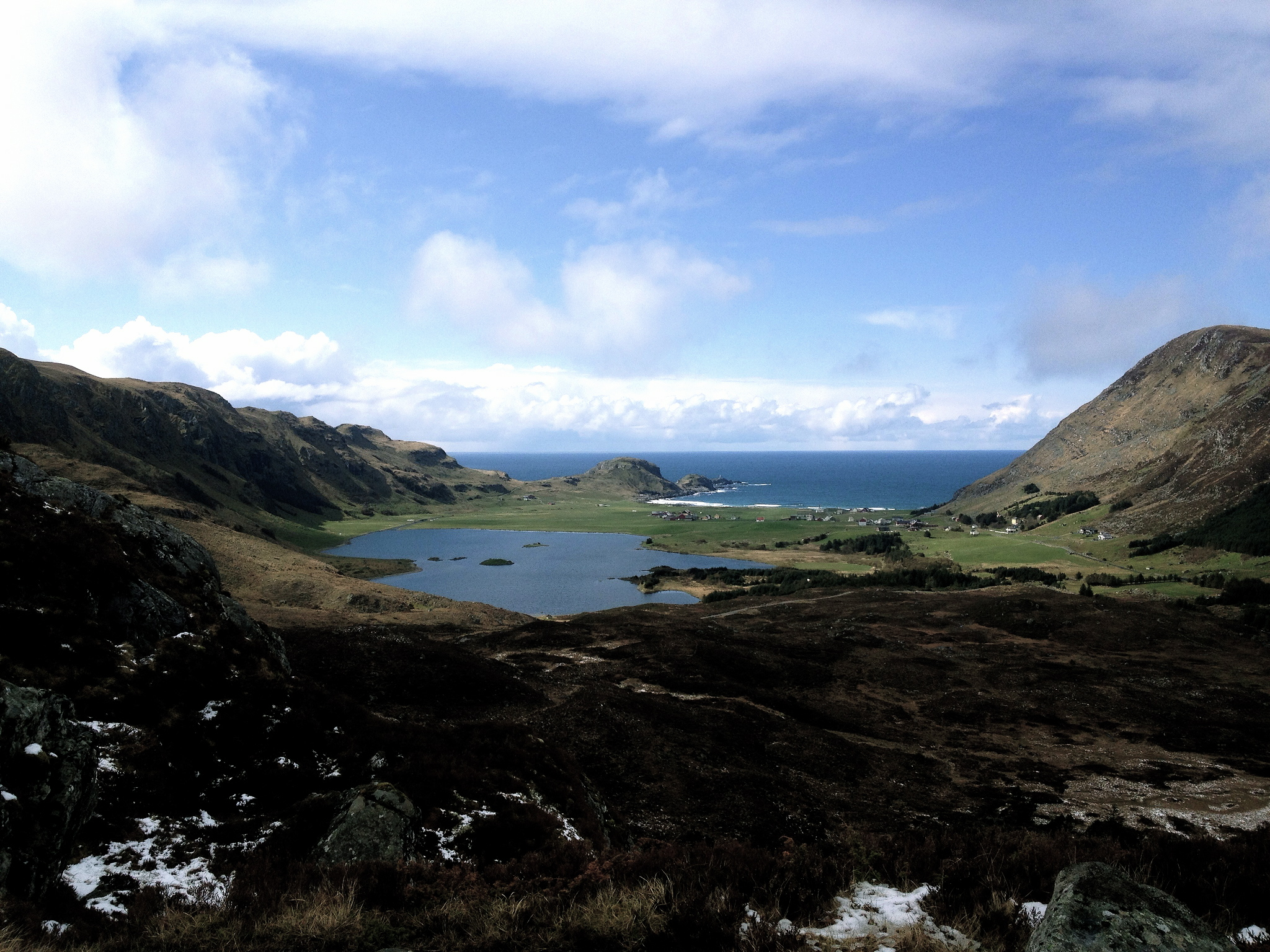 Beautiful Ervik in good weather